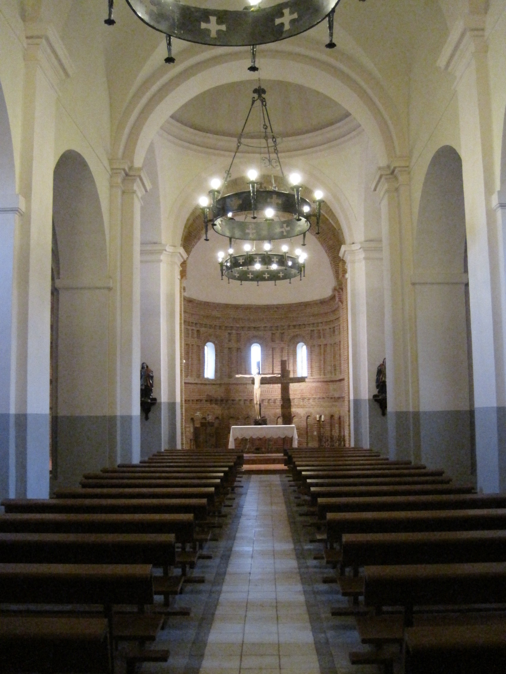 Nave central de la iglesia de San Gervasio y San Protasio, en Santervás de Campos (Valladolid, España).